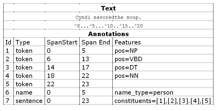 Результат анализа аннотирования